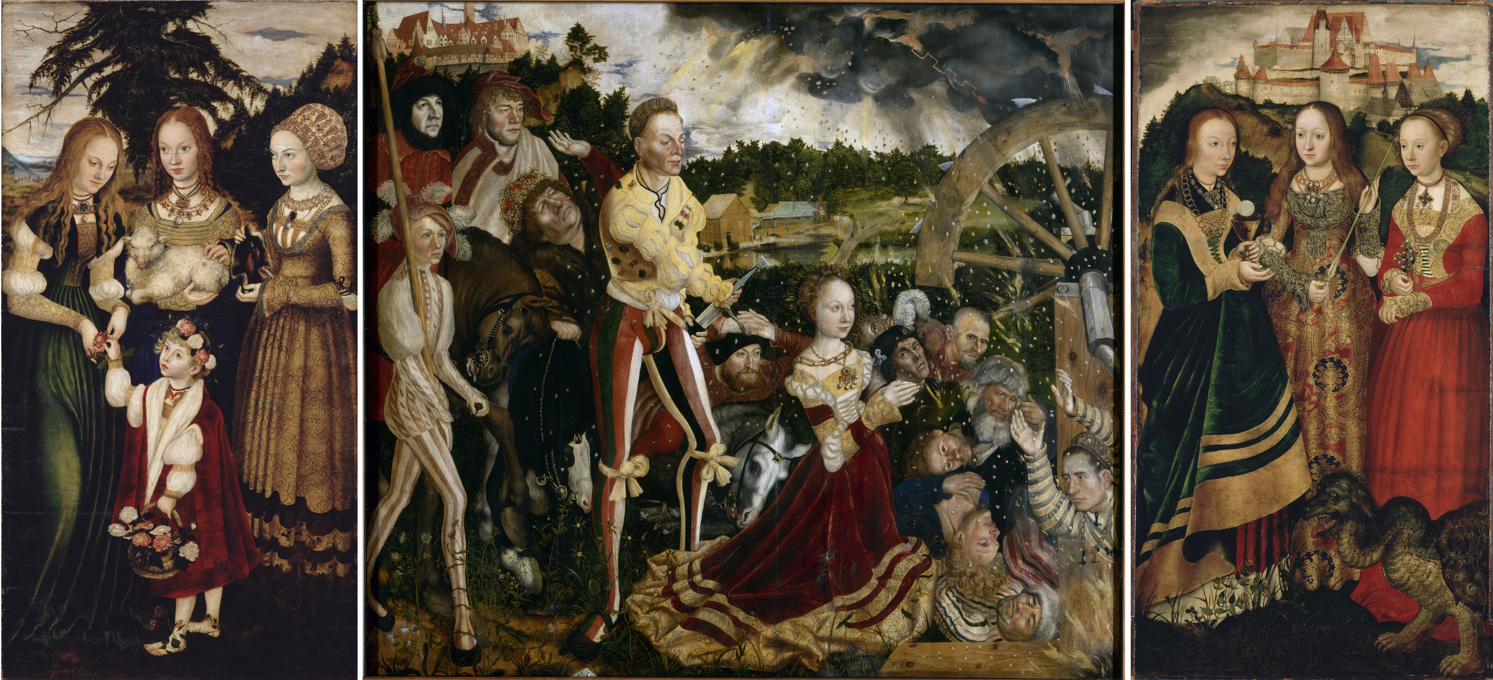 Katharinenaltar, Gesamtansicht, linker Flügel: Die Heiligen Dorothea, Agnes und Kunigunde, Mitteltafel: Martyrium der Hl. Katharina, rechter Flügel: Die Heiligen Barbara, Ursula und Margaretha